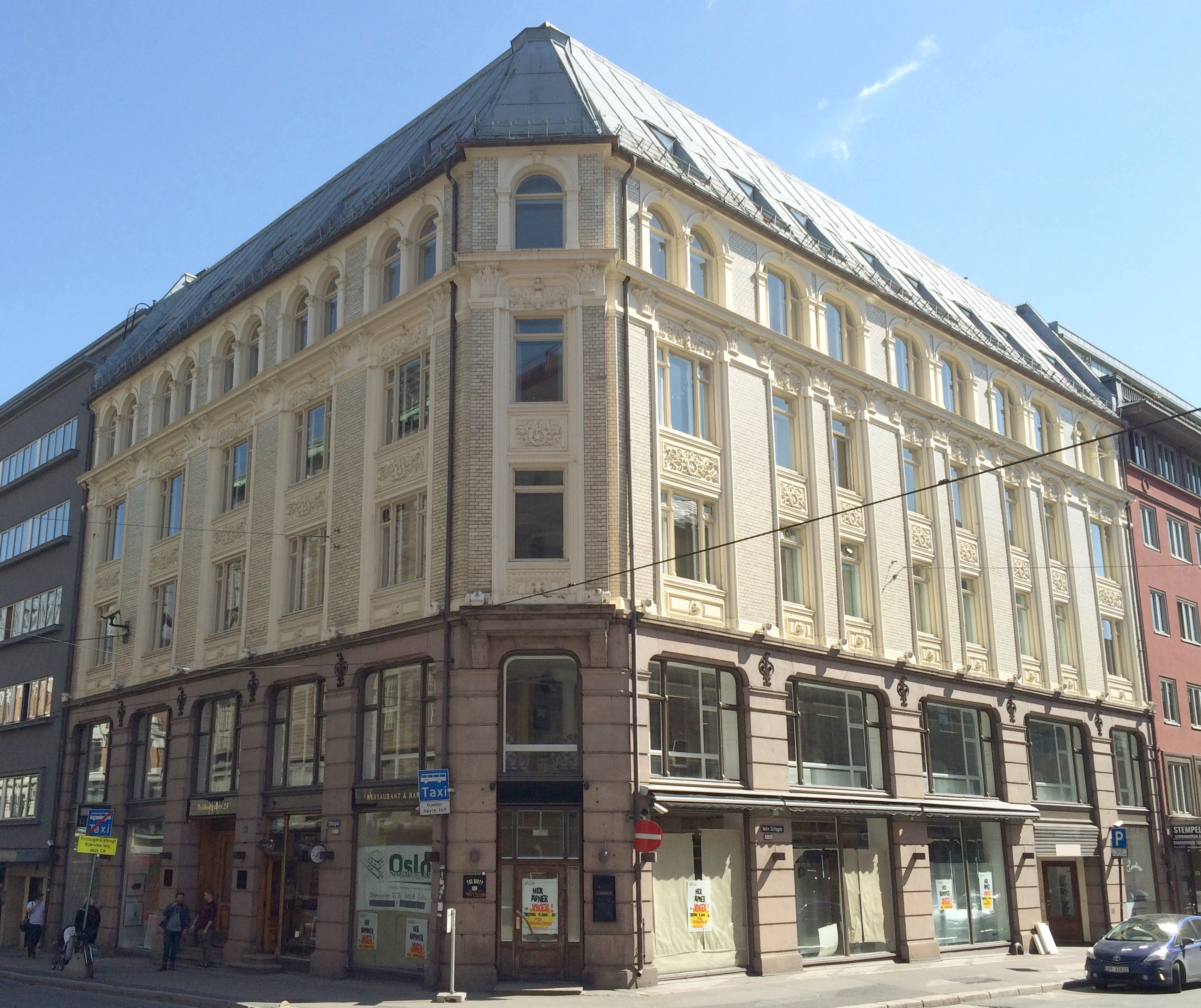 Tidligere hotell Augustin i Oslo. Arkitekt: Karl Høie (1898).